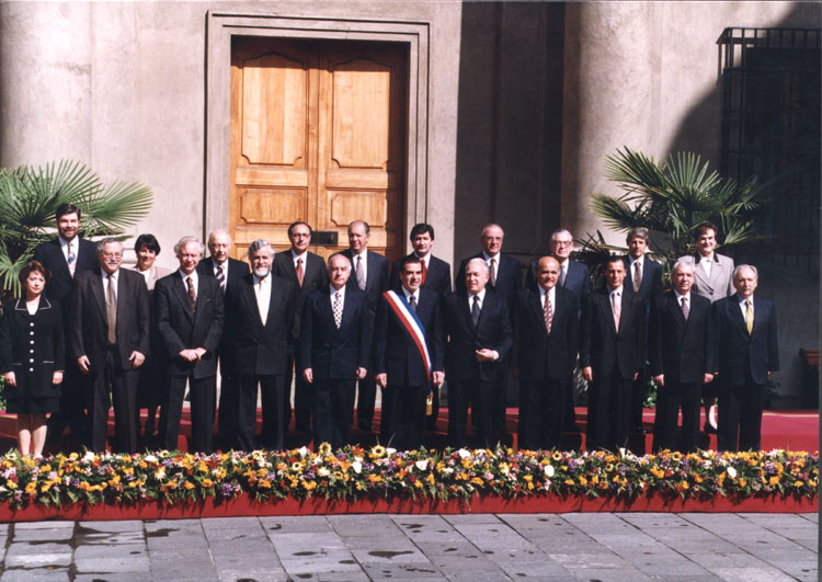 El Presidente Eduardo Frei Ruiz Tagle y su gabinete. La foto fue tomada en los jardines del Palacio de La Moneda Primera fila: Alvear, Soledad. Ministra de Justicia/ Maira, Luis. Ministro de Mideplan/ Brunner, José Joaquín. Ministro Secetario general de Gobierno/ Aninat, Eduardo. Ministro de Hacienda/ Figueroa, Carlos. Ministro del Interior/ Frei Ruiz Tagle, Eduardo. Presidente de Chile/ Pérez Yoma, Edmundo. Ministro de Defensa/ Arriagada, Genaro. Ministro Secretario General de la Presidencia/ García, Alvaro. Ministro de Economía/ Molina, Sergio. Ministro de Educación/ Arrate, Jorge. Ministro del Trabajo. Segunda fila: Sandoval. Corfo/ del Piano, Adriana. Ministra de Bienes Nacionales/ Teplisky, Benjamín. Ministro de Minería/ Hermosilla, Edmundo. Ministro de la Vivienda./ Lagos Escobar, Ricardo. Ministro de Obras Públicas/ Figueroa, Alex. Ministro de Salud/ Ortega, Emiliano. Ministro de Agricultura/ Irurieta, Narciso. Ministro de Transportes/ Jadresic, Alejandro. Ministro de Energía/ Bilbao, Josefina. Ministra de la Mujer.